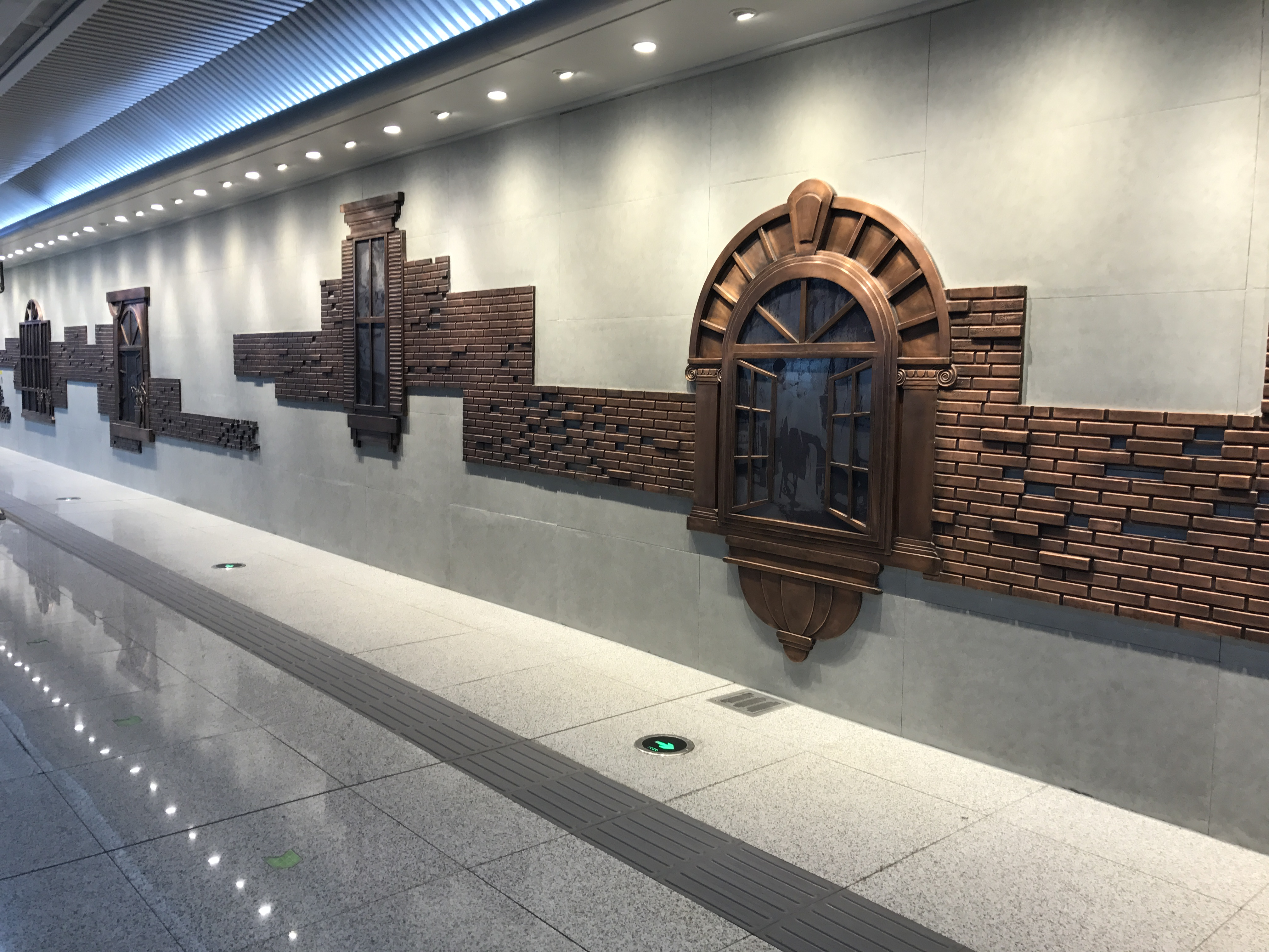 武胜路站艺术墙